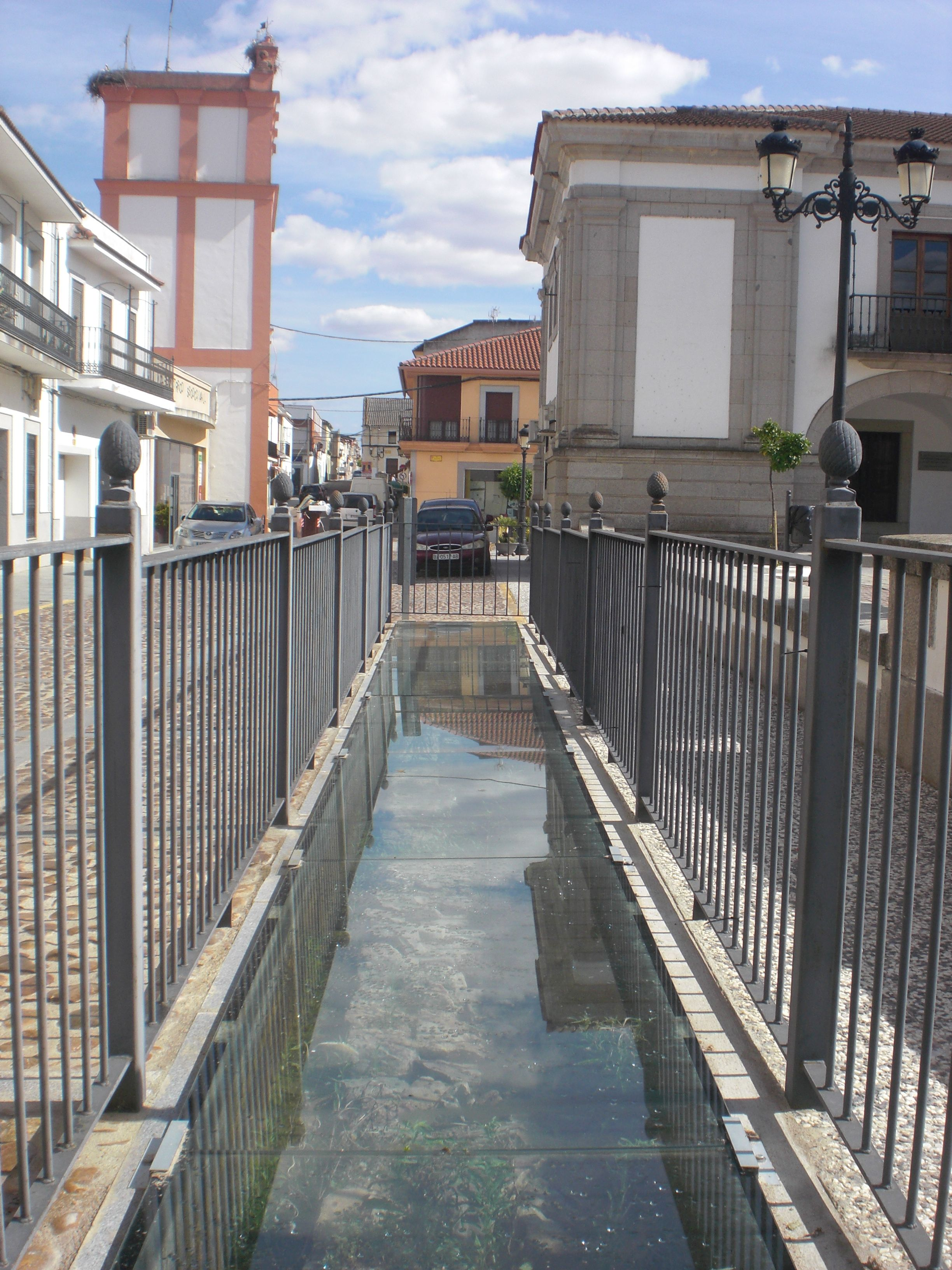 Restaĵoj de la Domo de Korteso en Medellín.